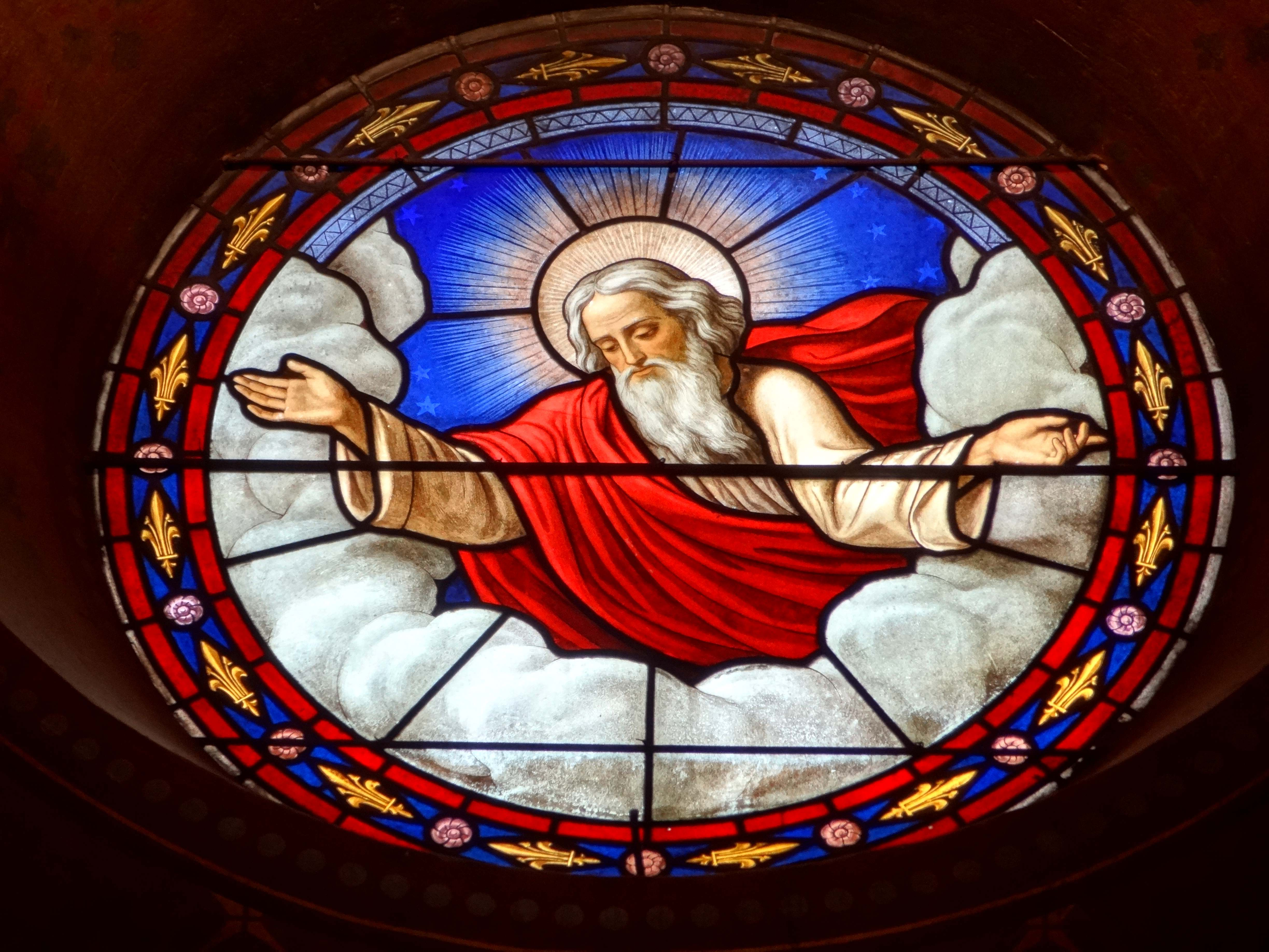 Verrière - voir titre.